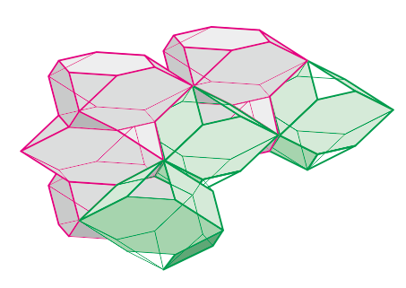 グラファイト構造